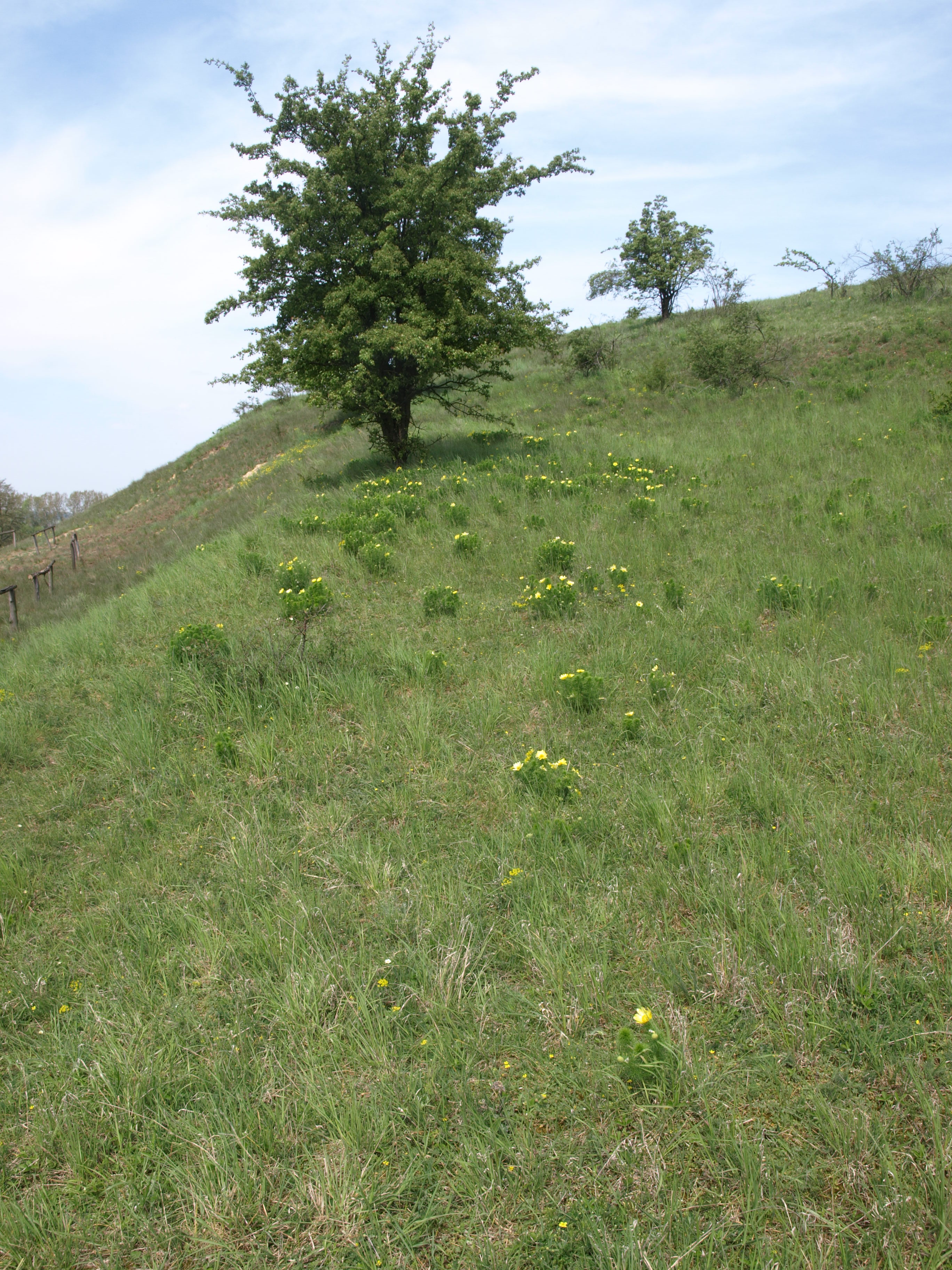 Adonisröschenblüte bei Mallnow in Brandenburg